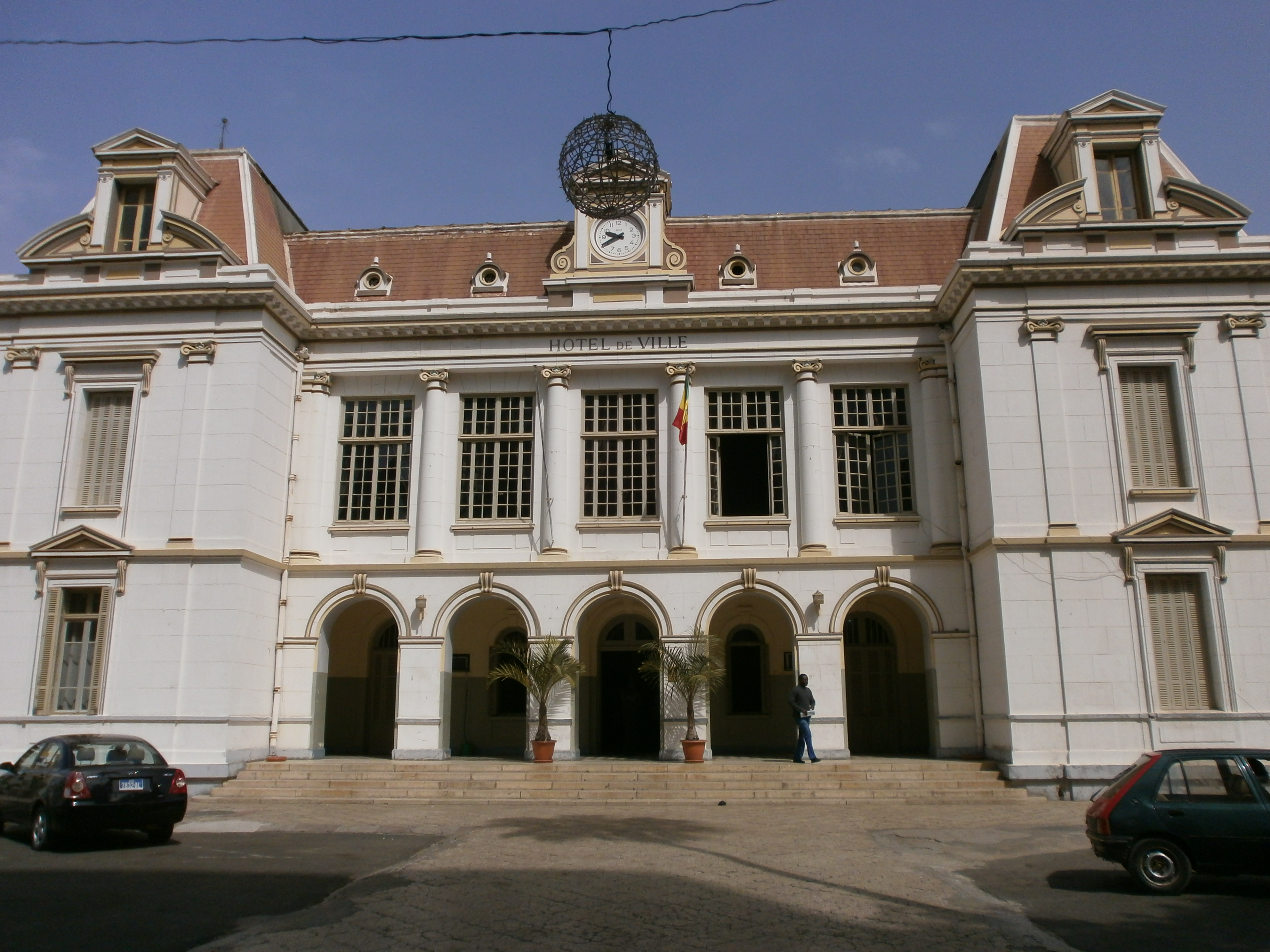 Hôtel de ville de Dakar, façade